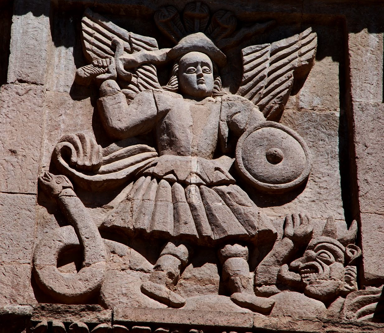 Arcángel San Miguel venciendo al demonio y la serpiente maligna. Iconografía de la danza de diablos o diablada en el Perú.